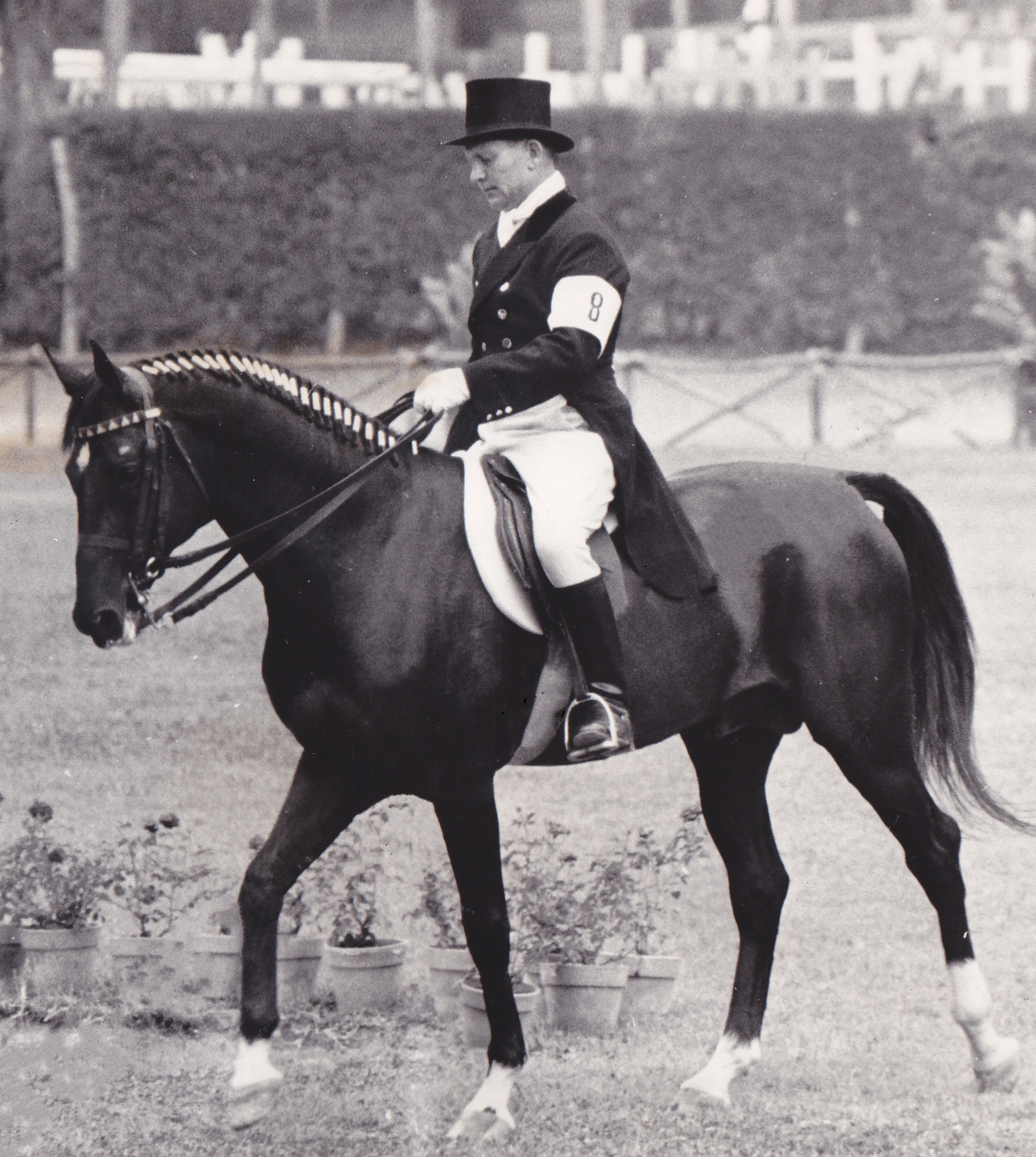 Sergei Filatov